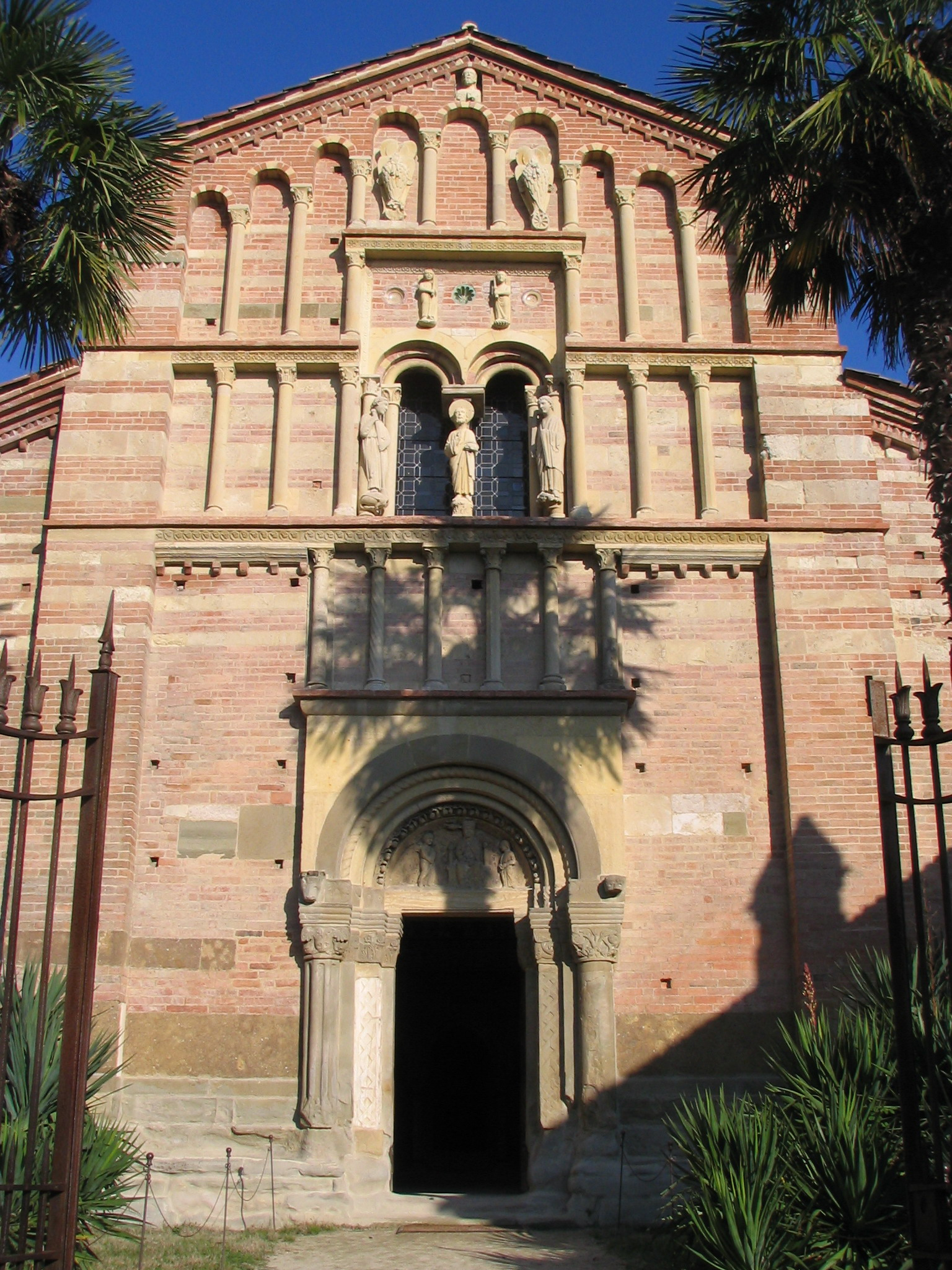 Abbazia di Vezzolano, facciata